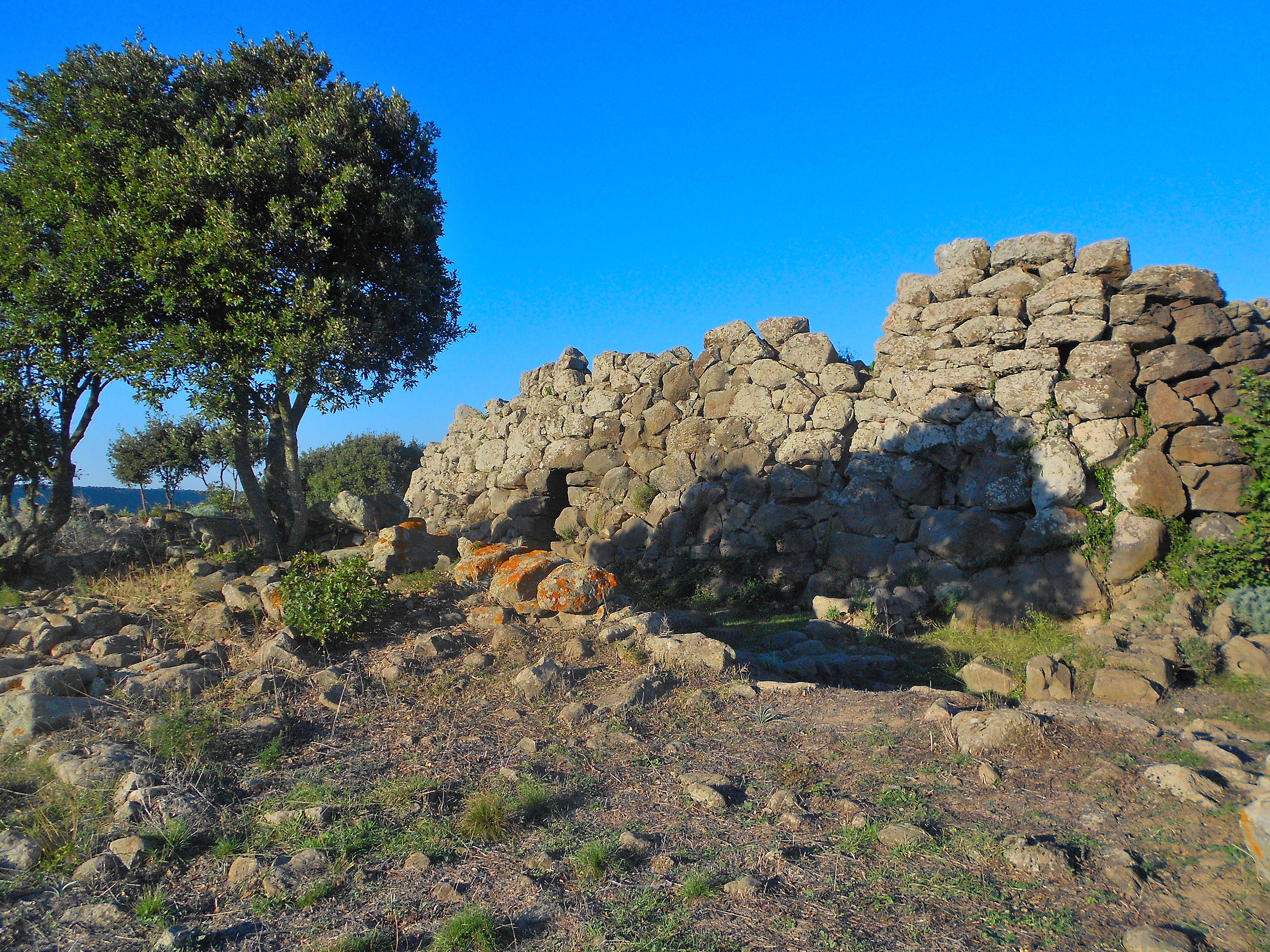 Nuraghe Sa Fogaia This is a photo of a monument which is part of cultural heritage of Italy.